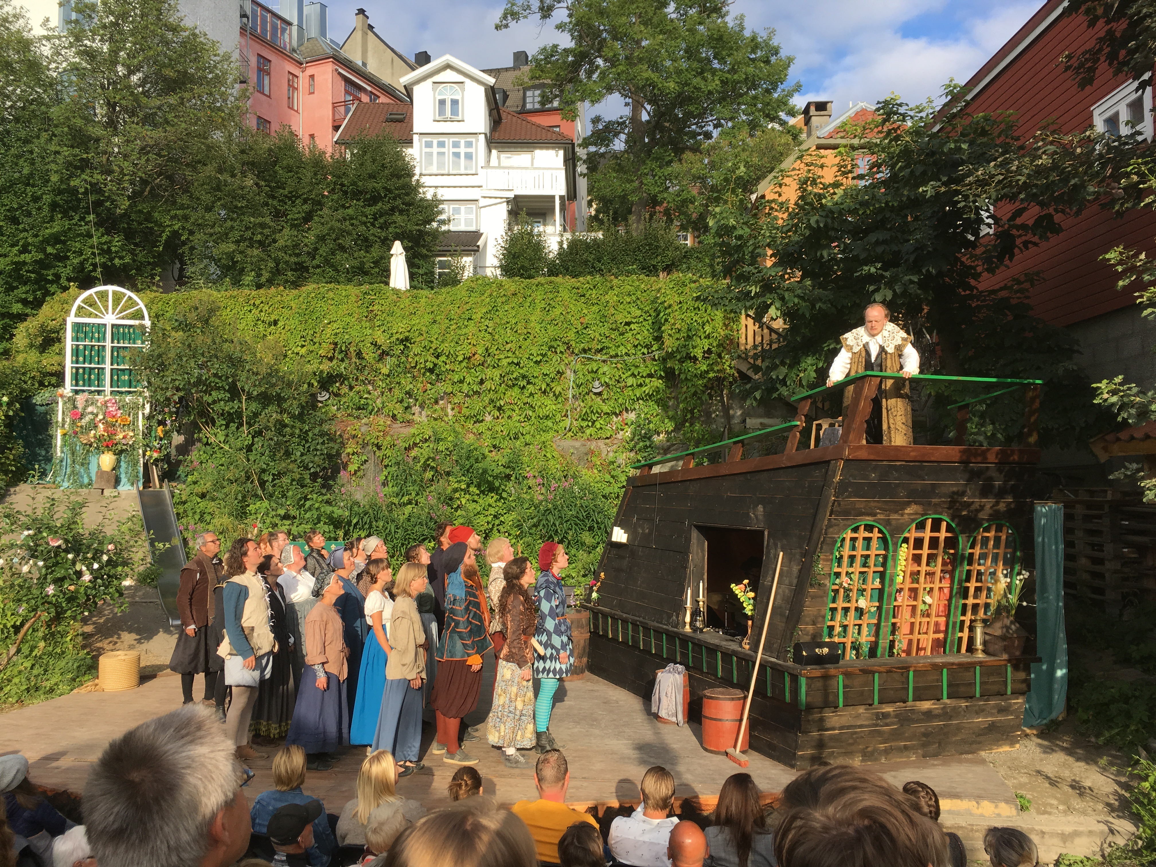 Rabarbrateaterets Shakespeareforestilling sommeren 2019: Trettendagskvelden, i Rabarbraparken, Bakklandet